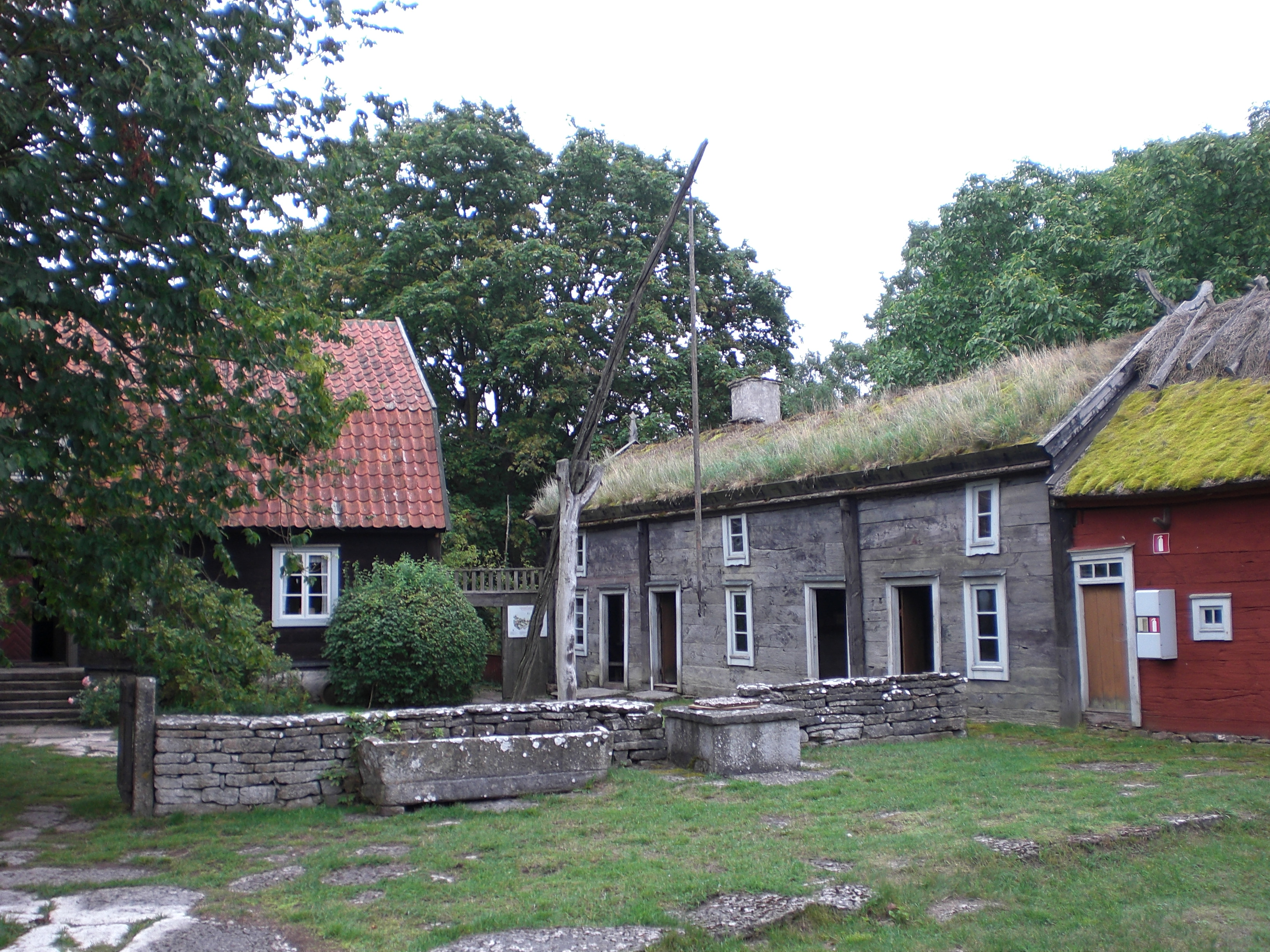 Bauernhof Norragarden in Himmelsberga Öland, links Wohnhaus, rechts Schuppen